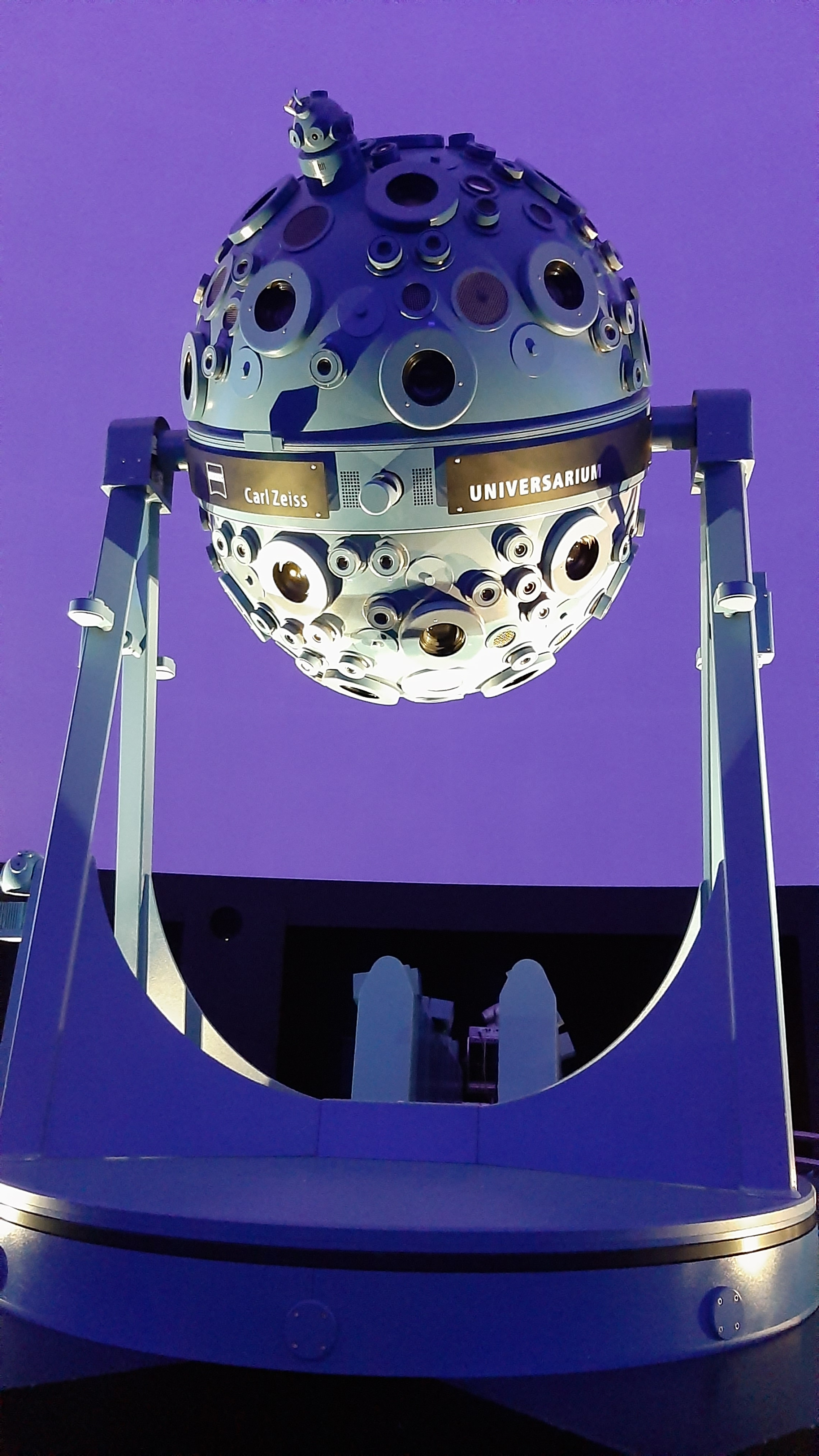 Zeiss Planetarium Bochum. Projektor